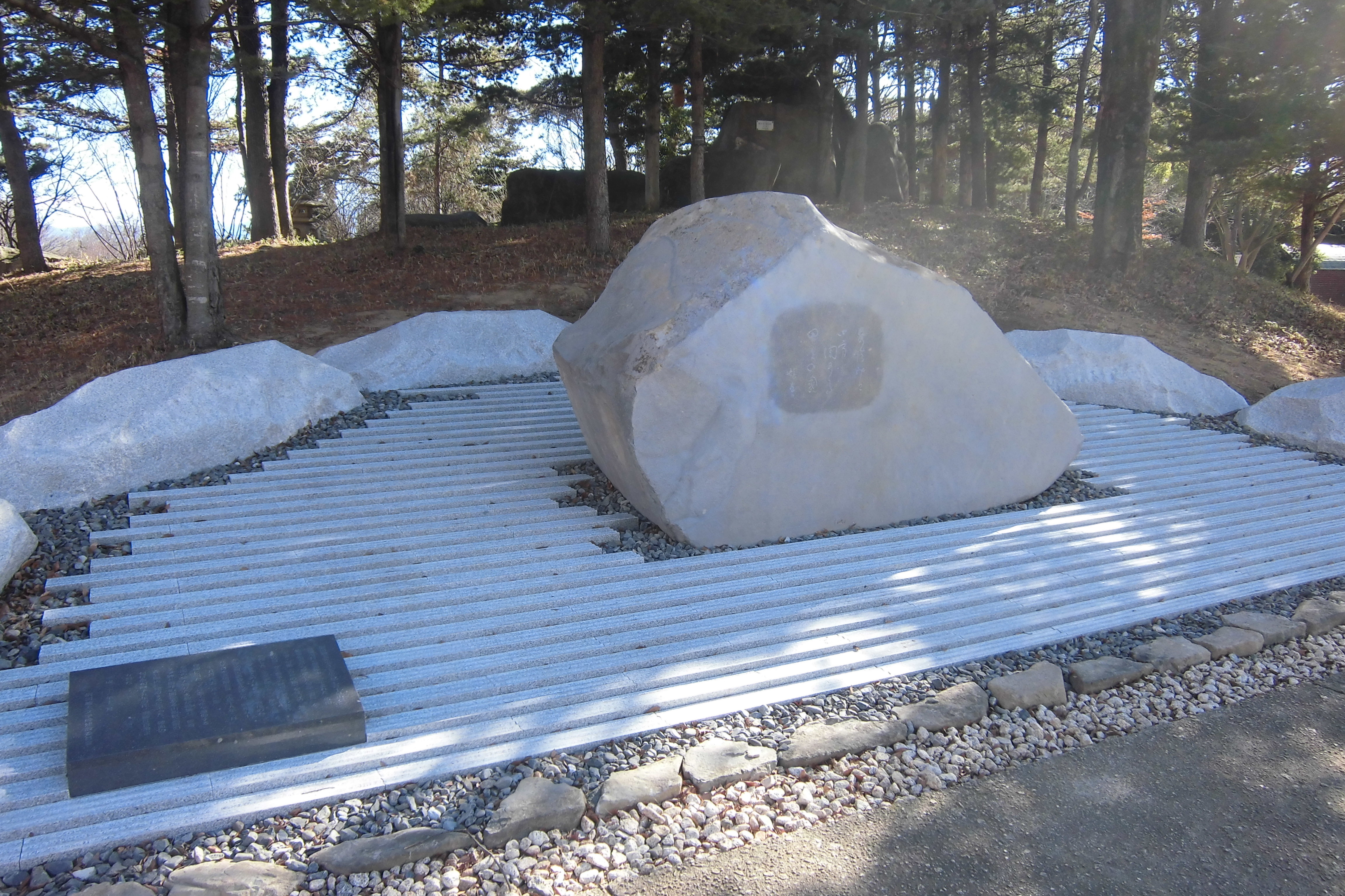 飯田龍太歌碑（芸術の森公園）